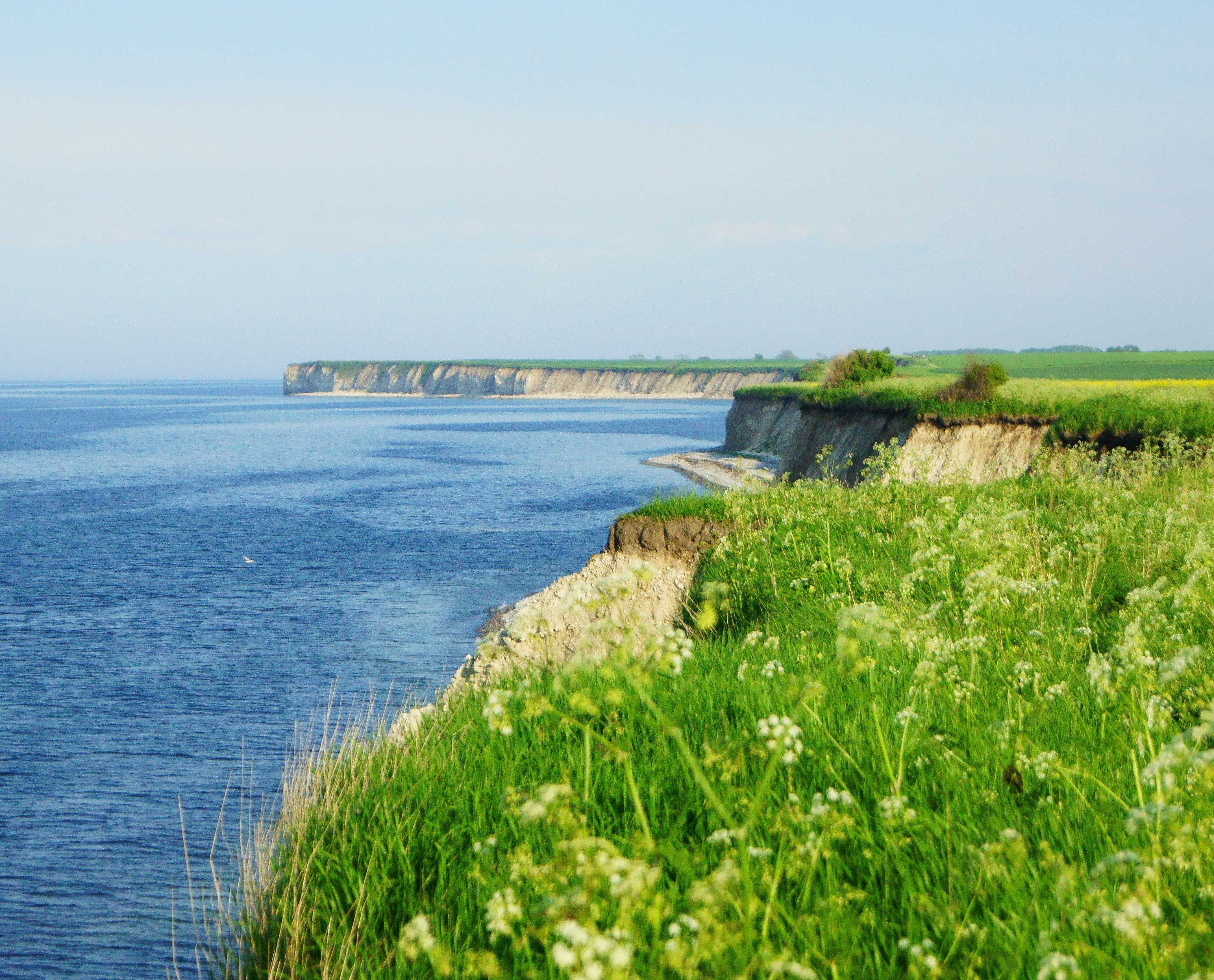 Sangstrup Klint forsommer